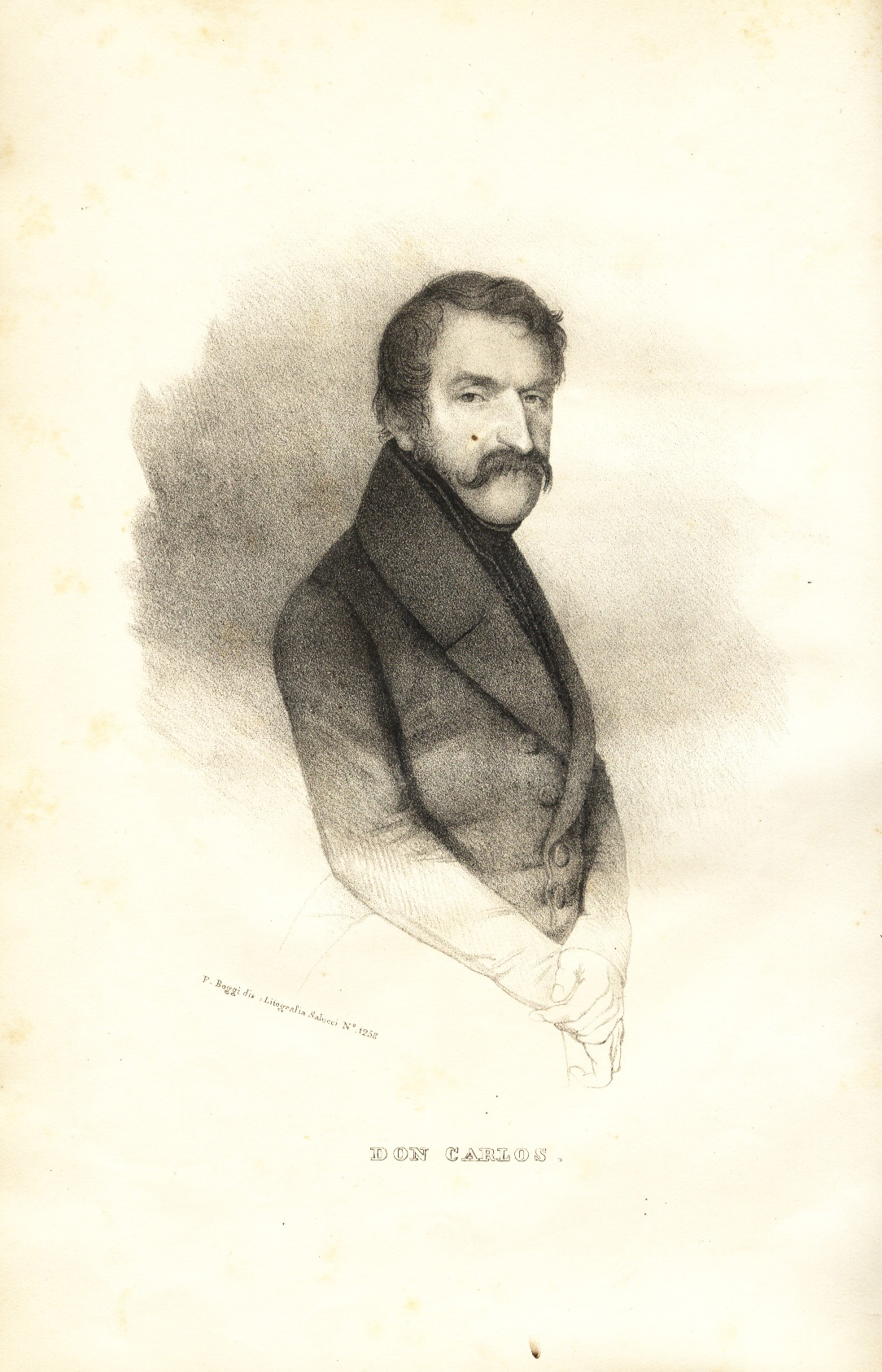 Don Carlos. Dibujo de Isidoro Magués. "Don Carlos e i suoi difensori". Firenze 1837